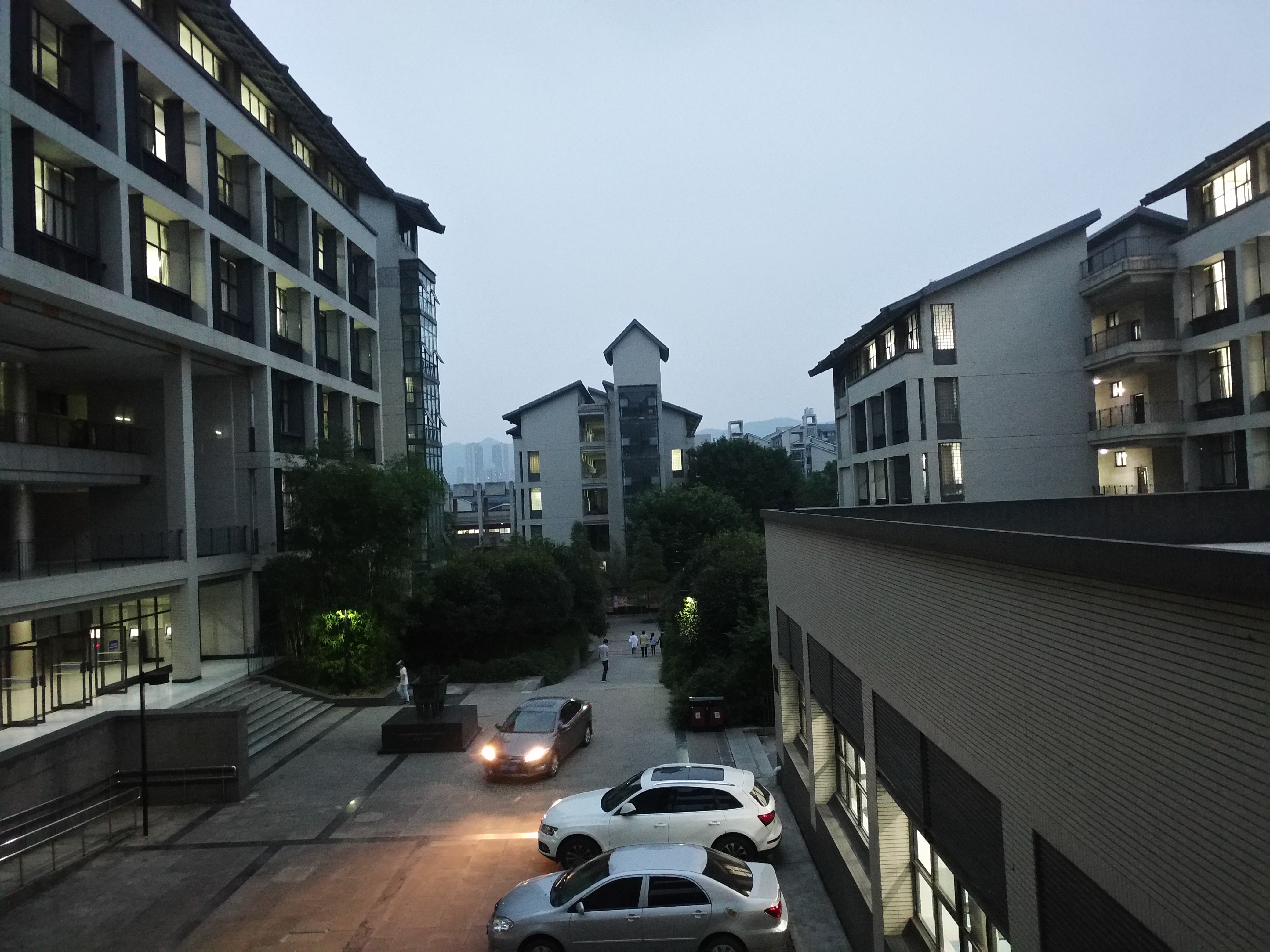 中文（中国大陆）: 重庆理工大学夜景，左侧为第一教学楼背面，右侧为第三教学楼前面，中及中左区域为第二教学楼侧面，中右远景则为学生公寓楼群。